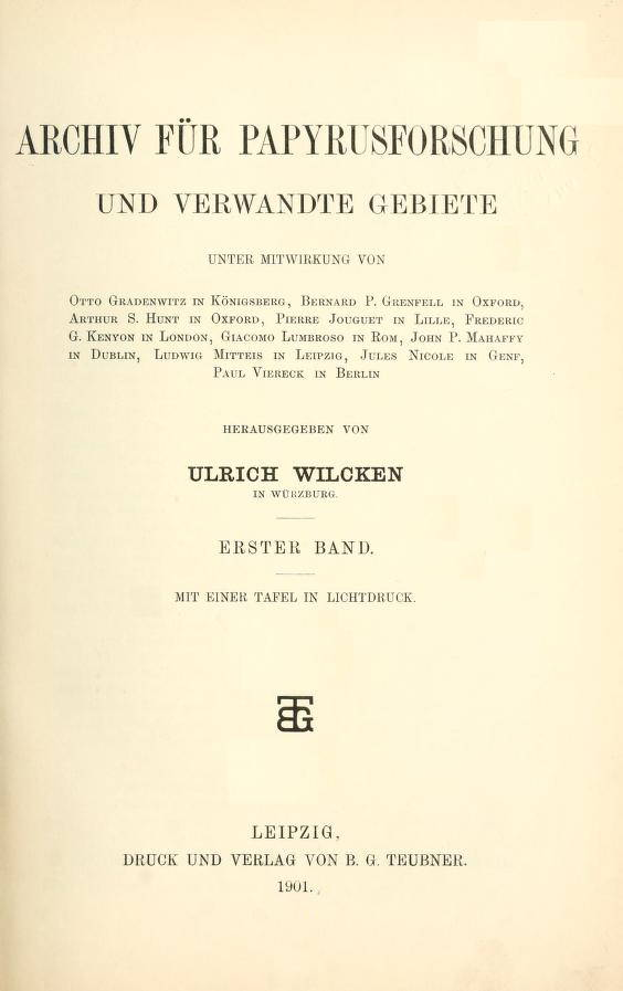 Titelseite der Zeitschrift / Title page of the periodical